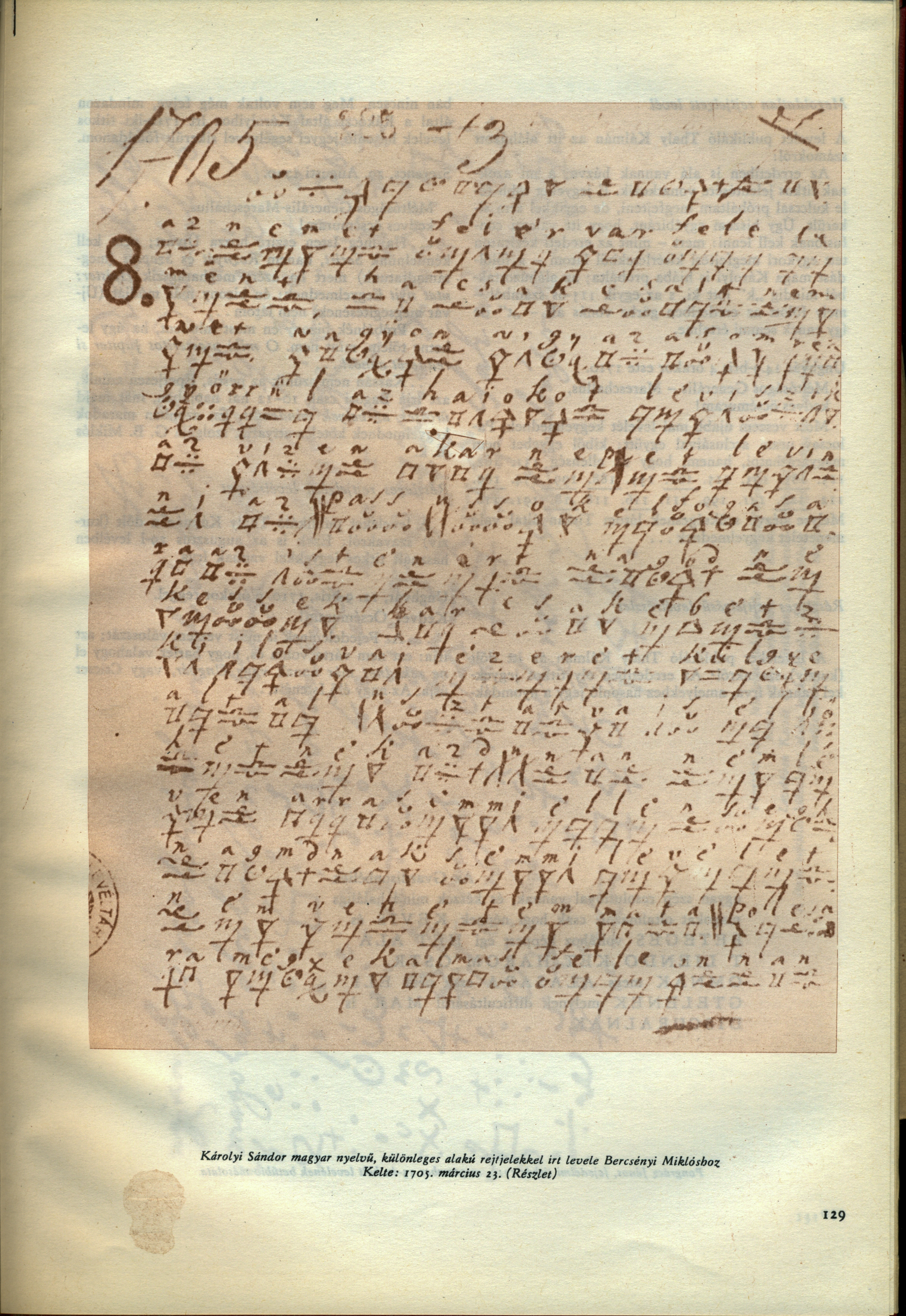 Encrypted letter of Sándor Károlyi to Miklós Bercsényi, detail